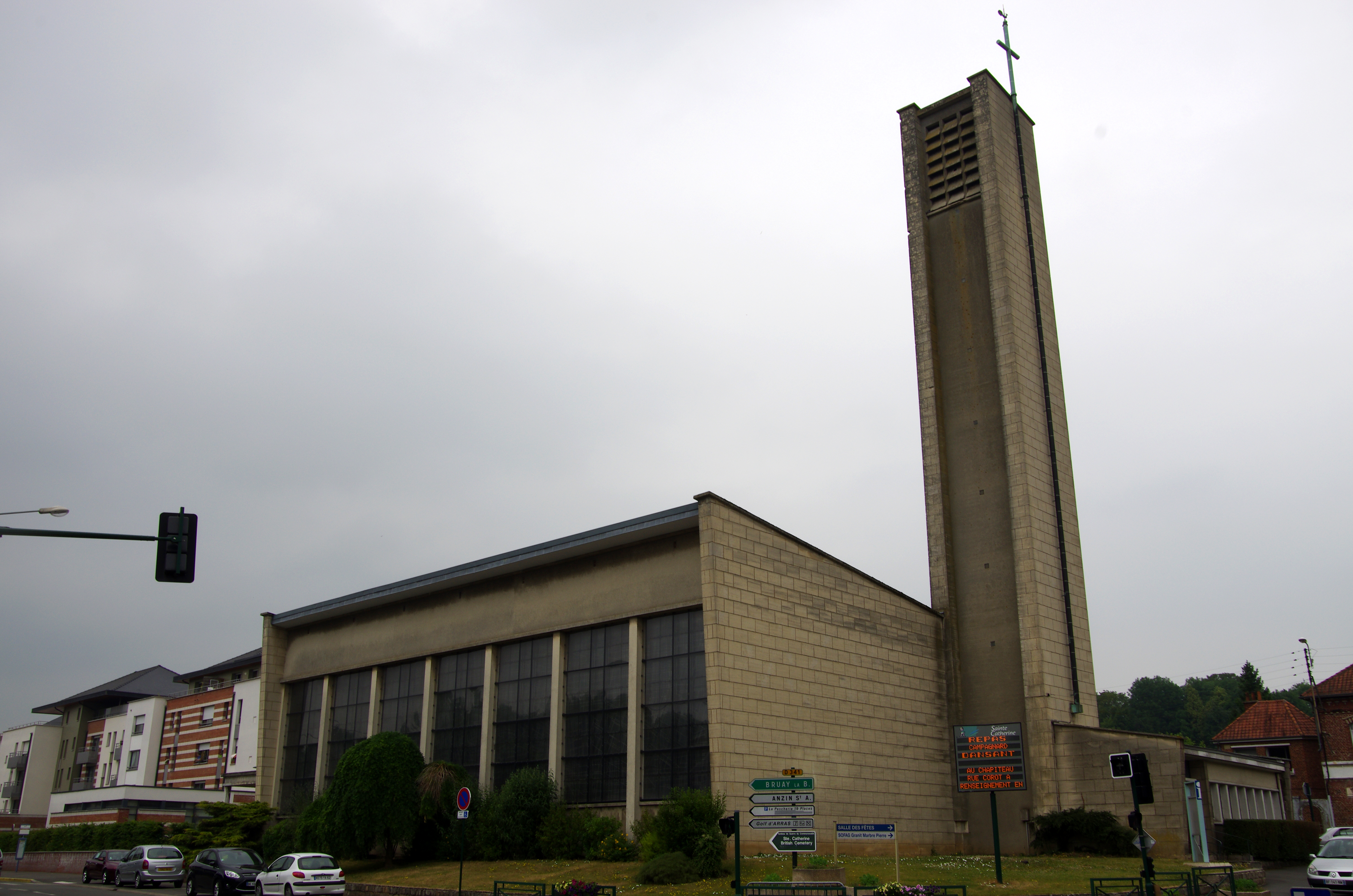 Sainte-Catherine-lès-Arras (Pas-de-Calais, France) - L'église. .